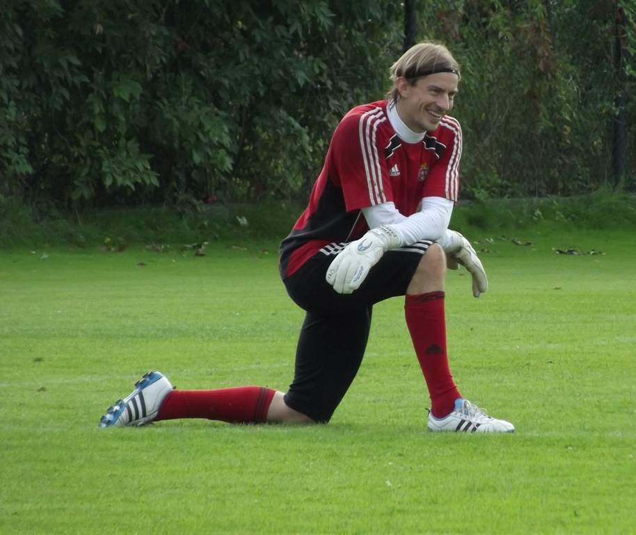 Zdjęcie zrobione podczas treningu przed meczem Wisła Kraków - APOEL Nikozja.